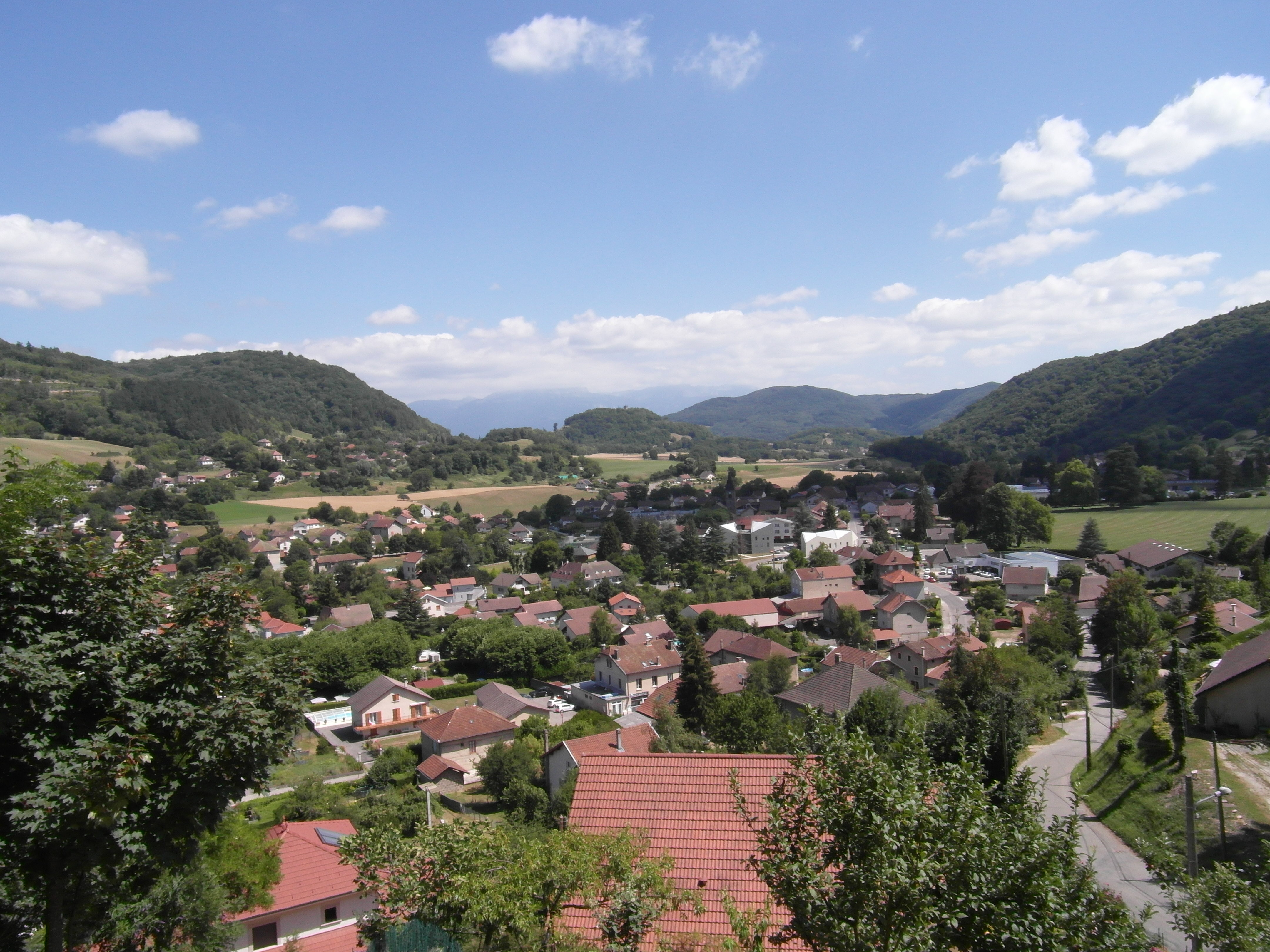 Vue de Charavines vers Clermont